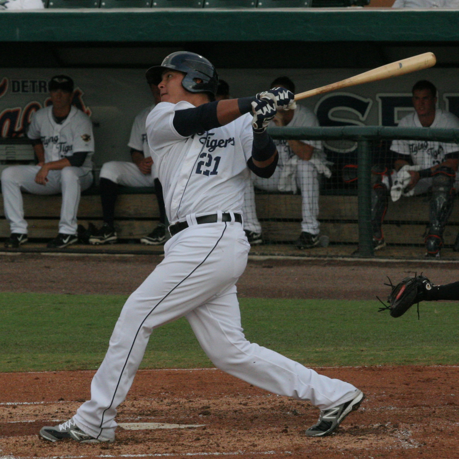 Avisail García